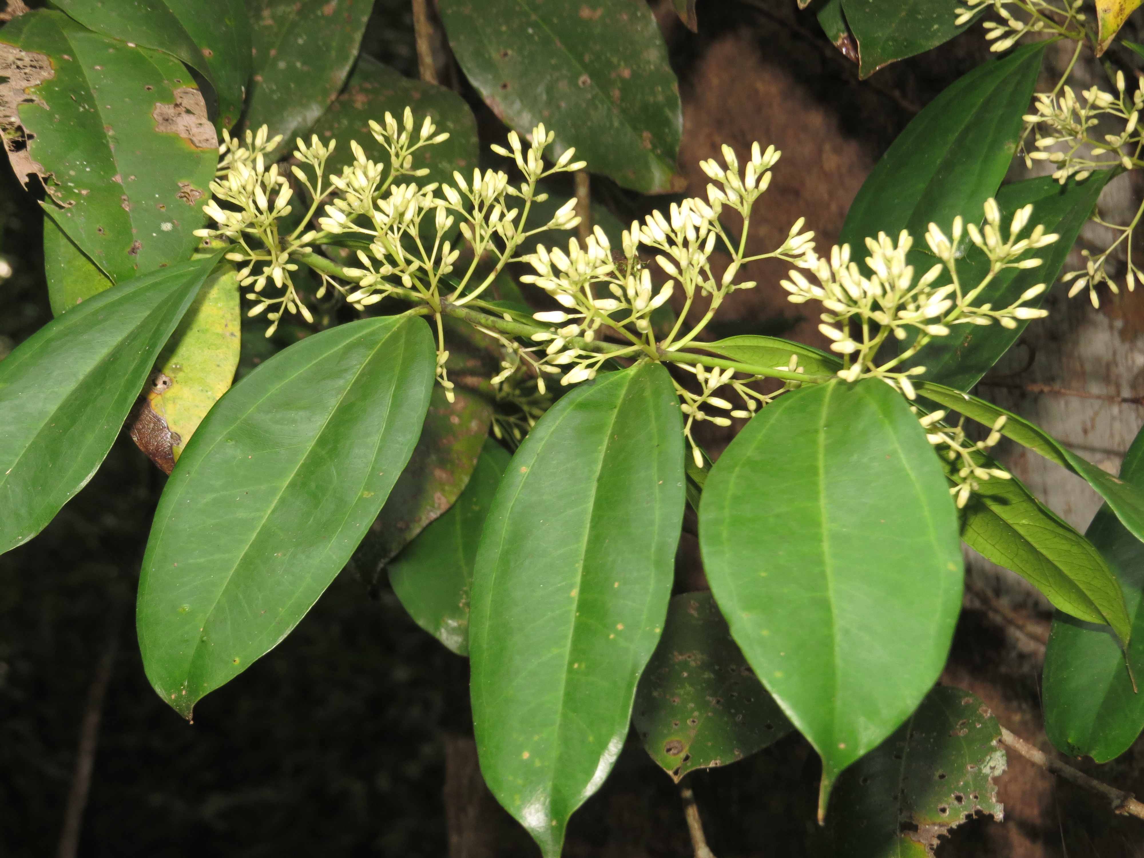 Miscellaneous Photos